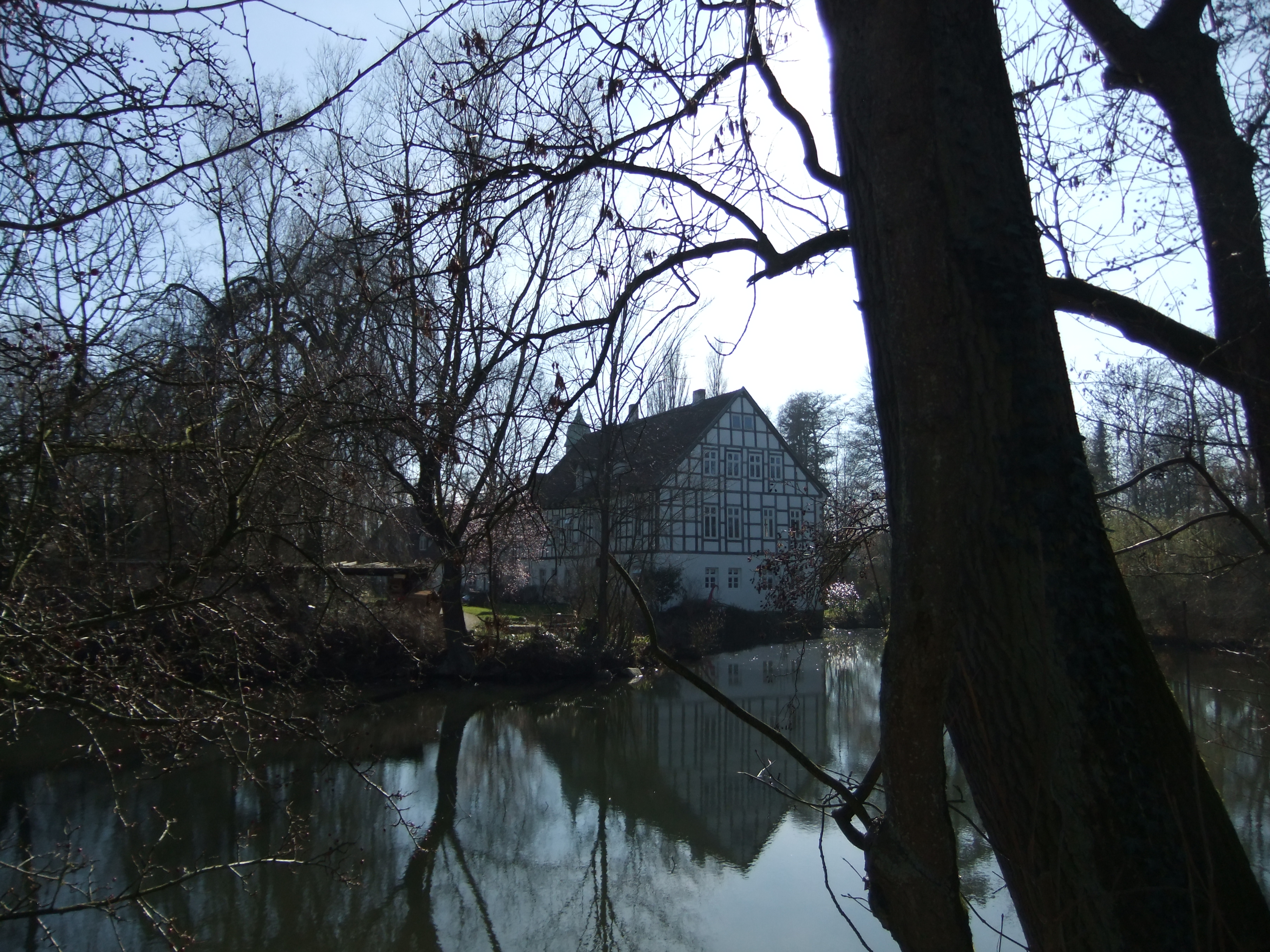 Gut Lübrassen im Bielefelder Stadtteil Heepen. Denkmal.